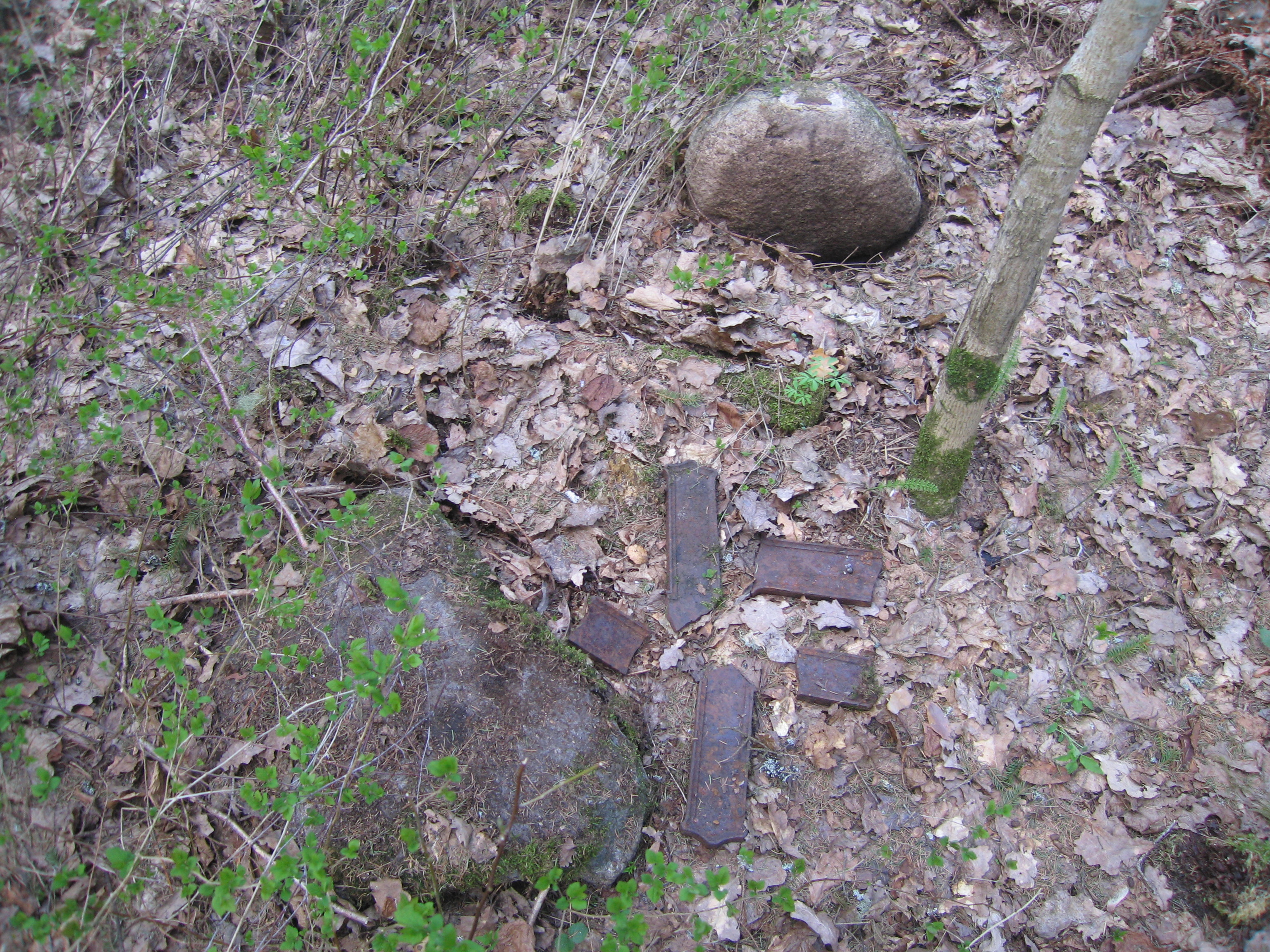 Hauatähiseid kalmistul. Foto: Robert Treufeldt, 30. aprill 2011